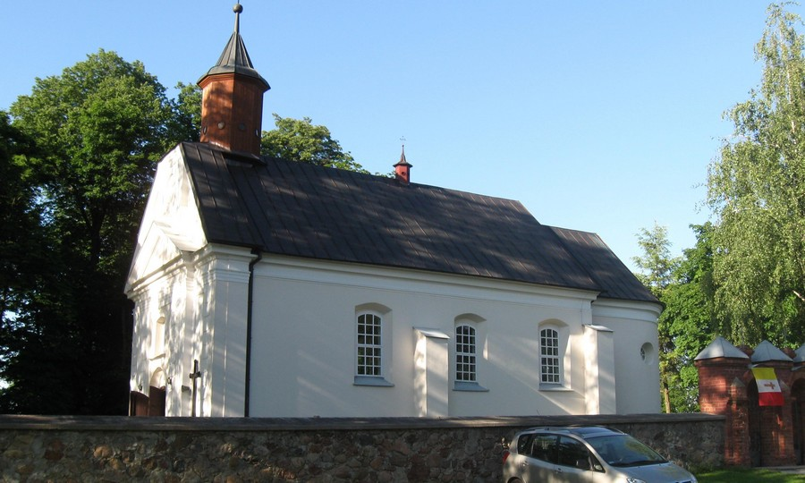 Strabla, kościół